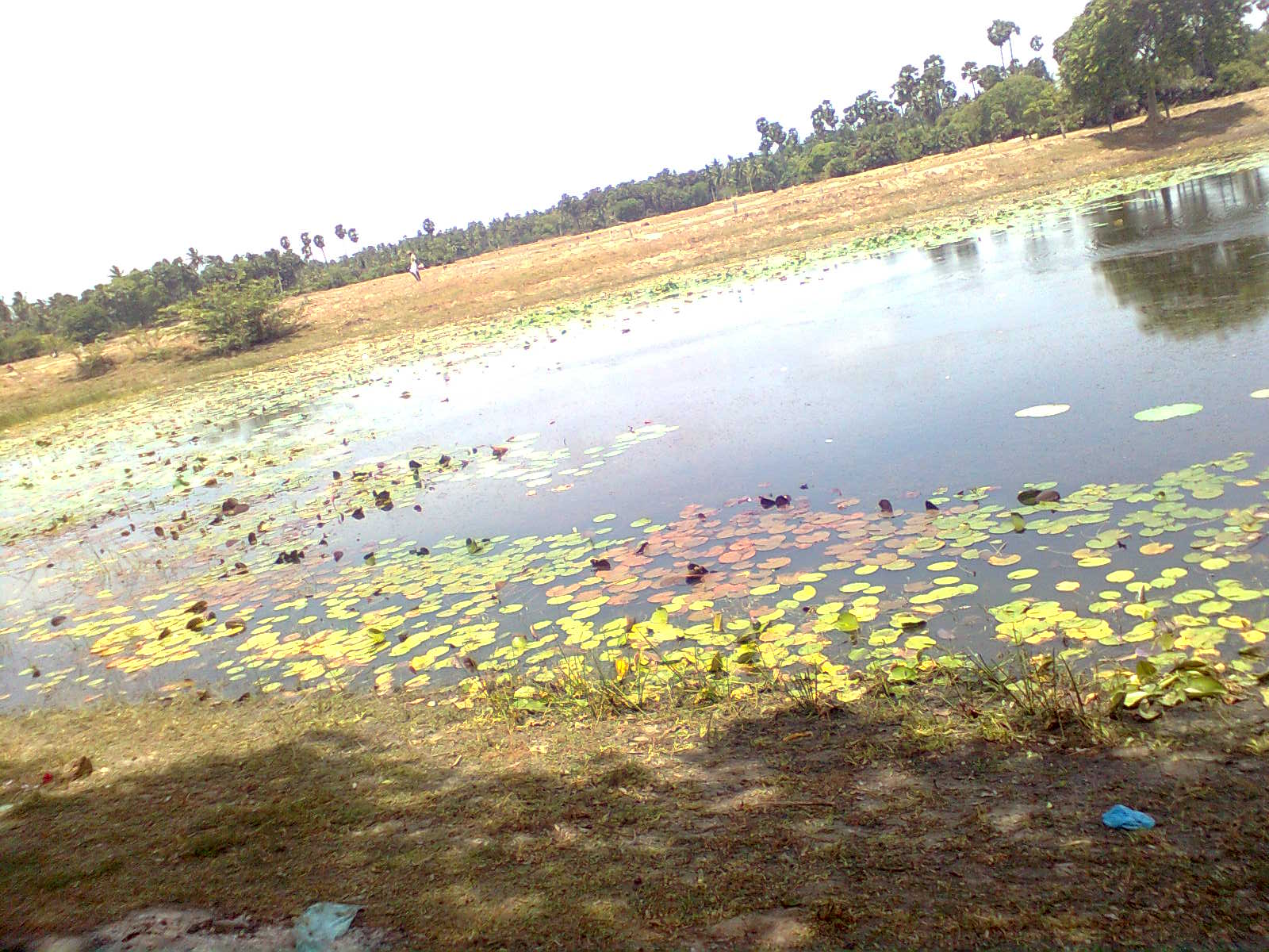 தும்புருவில் தீர்த்தக்கரை